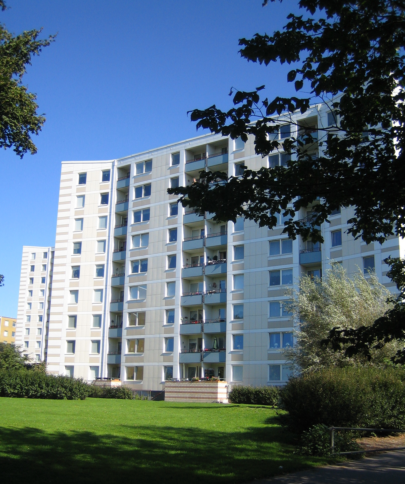 Almgården, Malmö, Sweden